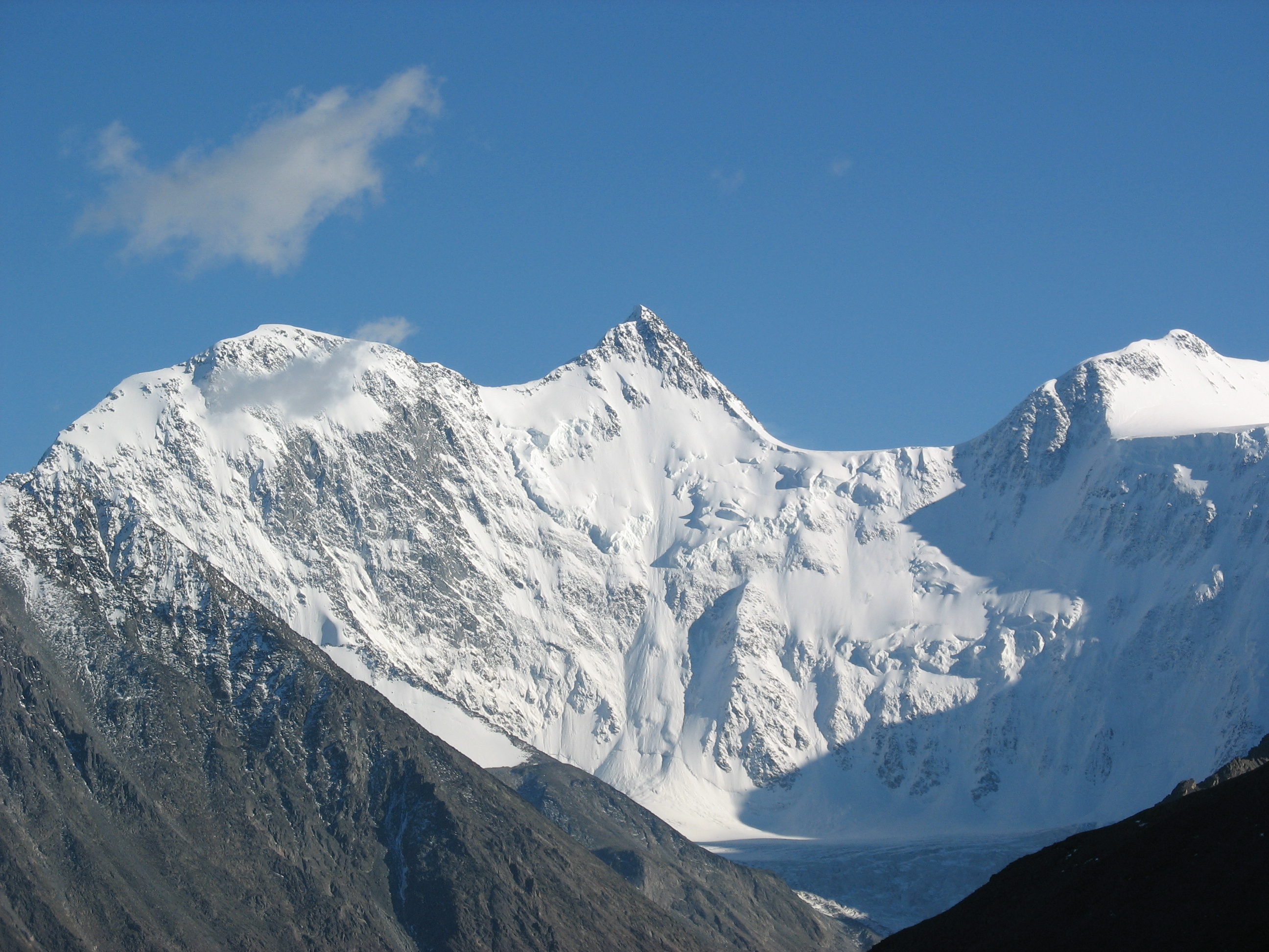 г. Белуха